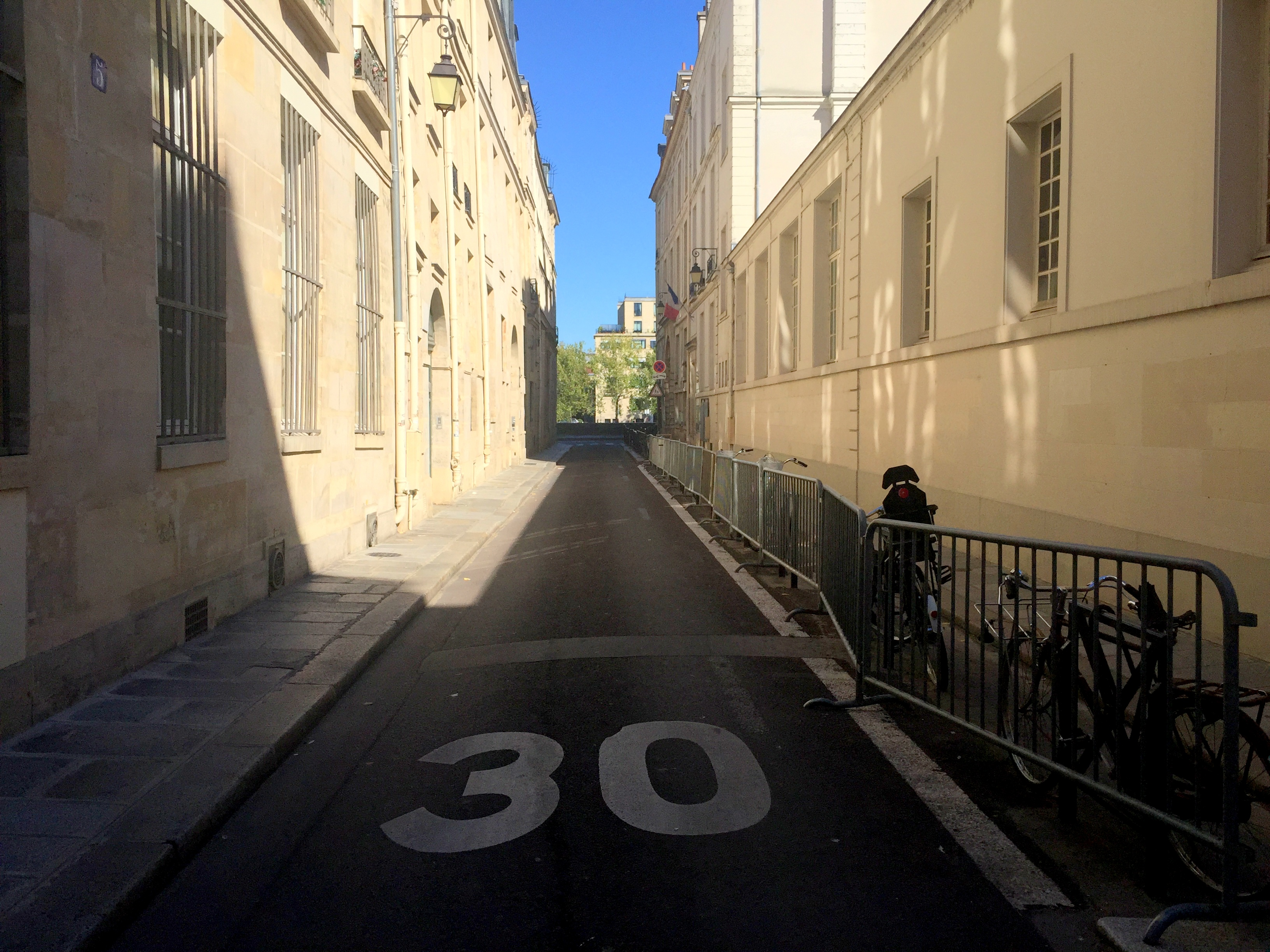 Rue Poulletier, Paris.